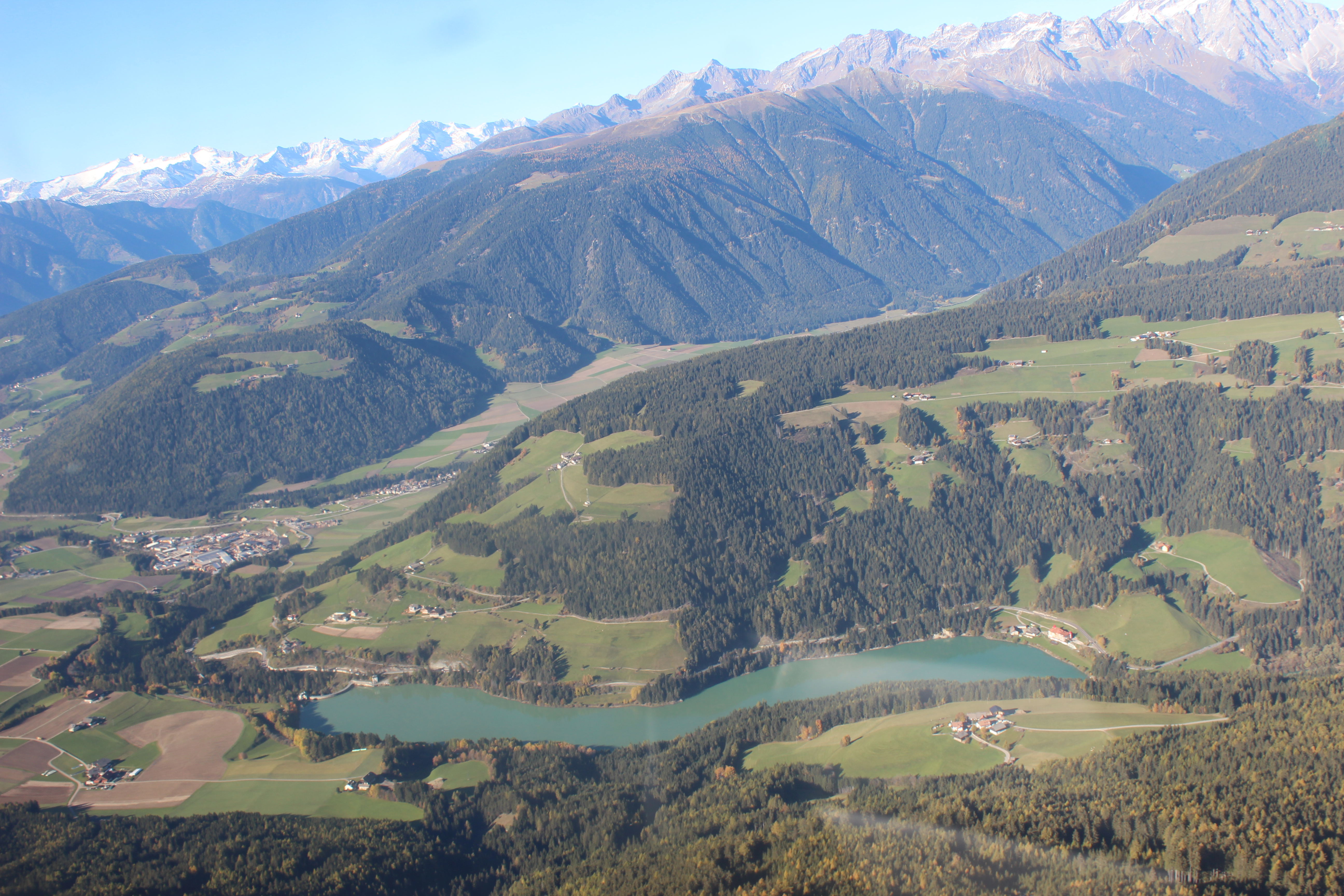 Luftaufnahme dess Olanger Stausee in Südtirol, Italien.